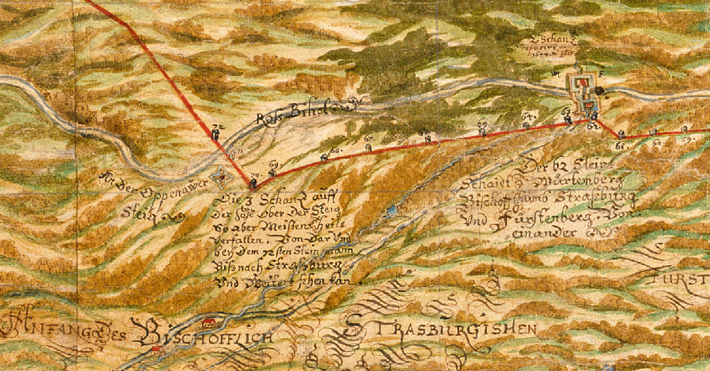 Auschnitt aus der Stebenhaber-Karte